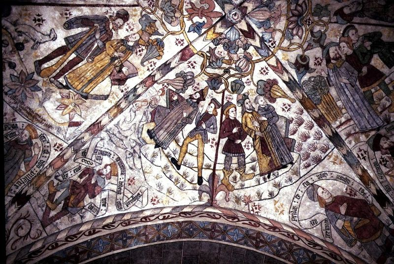 Färlöv kyrka i Skåne, Sverige. Korhvælv vestkappe